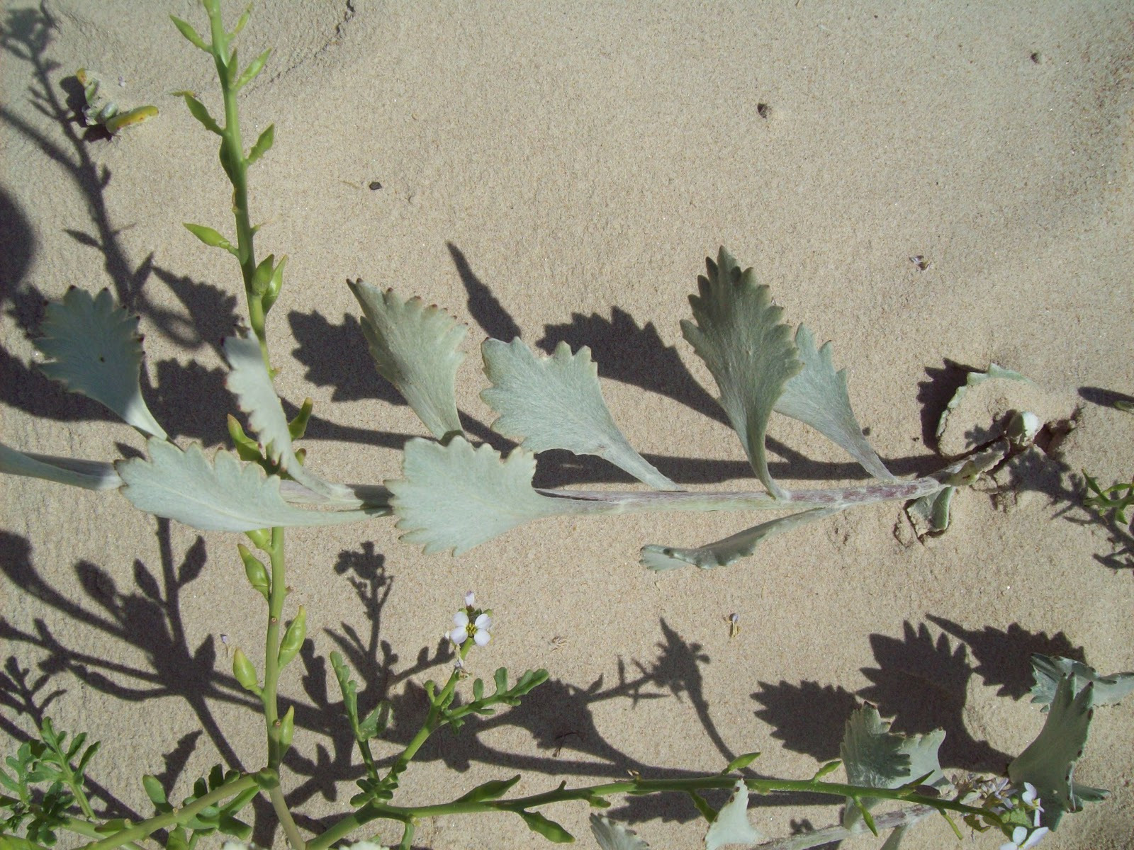 Senecio crassiflorus. Asteraceae. Fotos tomadas sobre dunas al margen del Río de la Plata en Carrasco, departamento de Canelones, Uruguay.